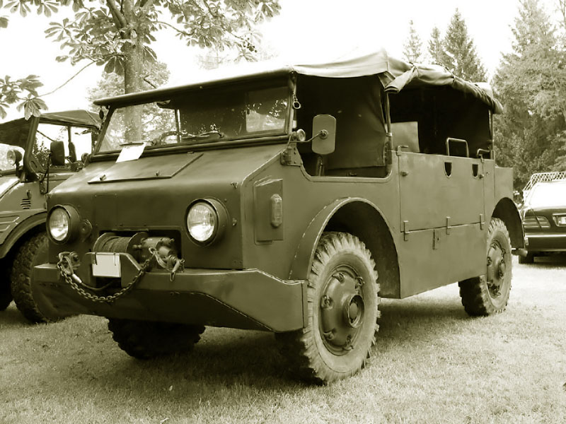 Militär-LKW Saurer 4 MH von 1954